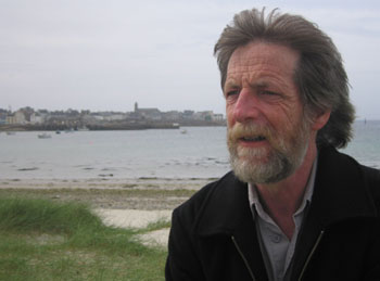 Louis Capart à l'Île de Sein 02/05/05